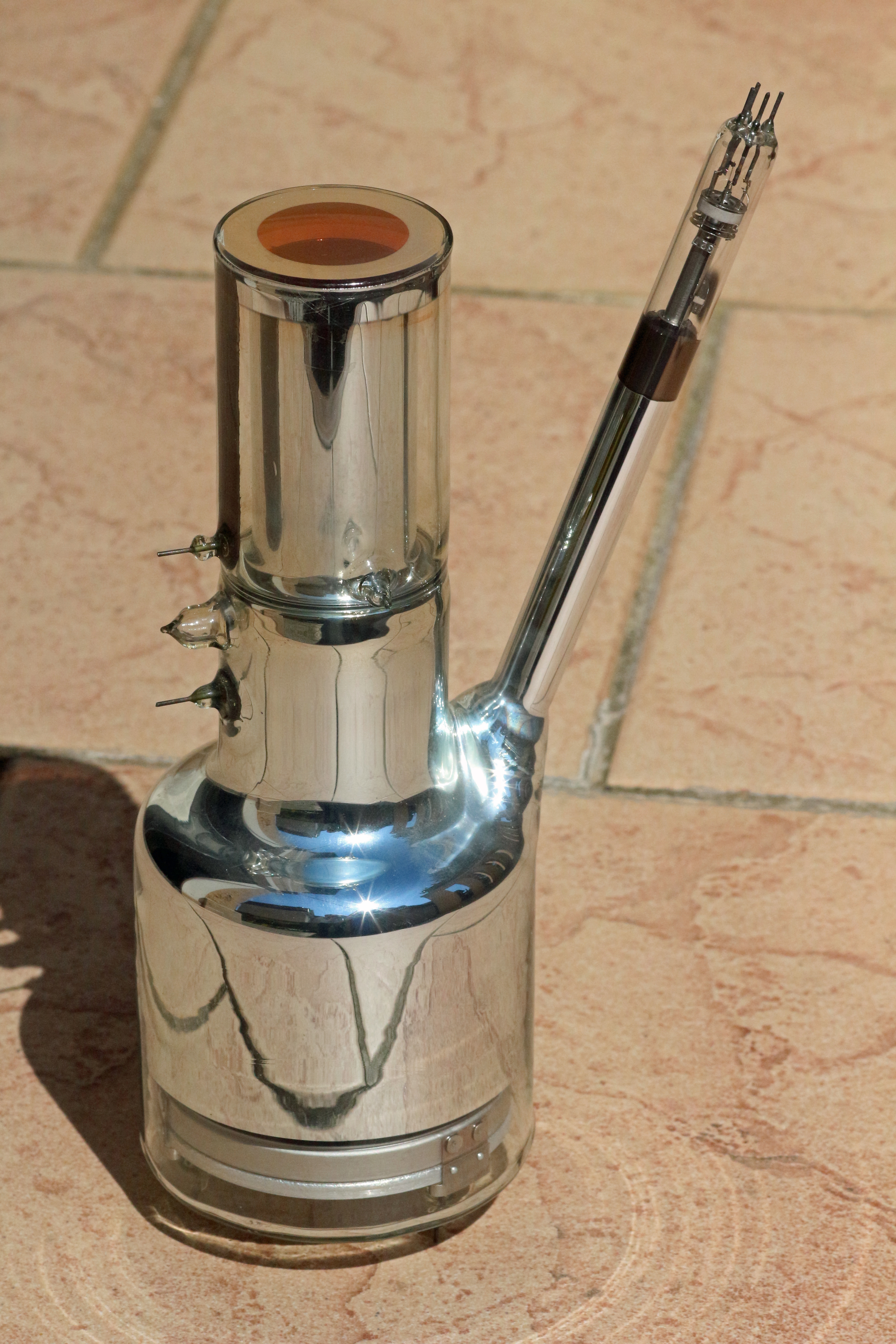 Super-Ikonoskop